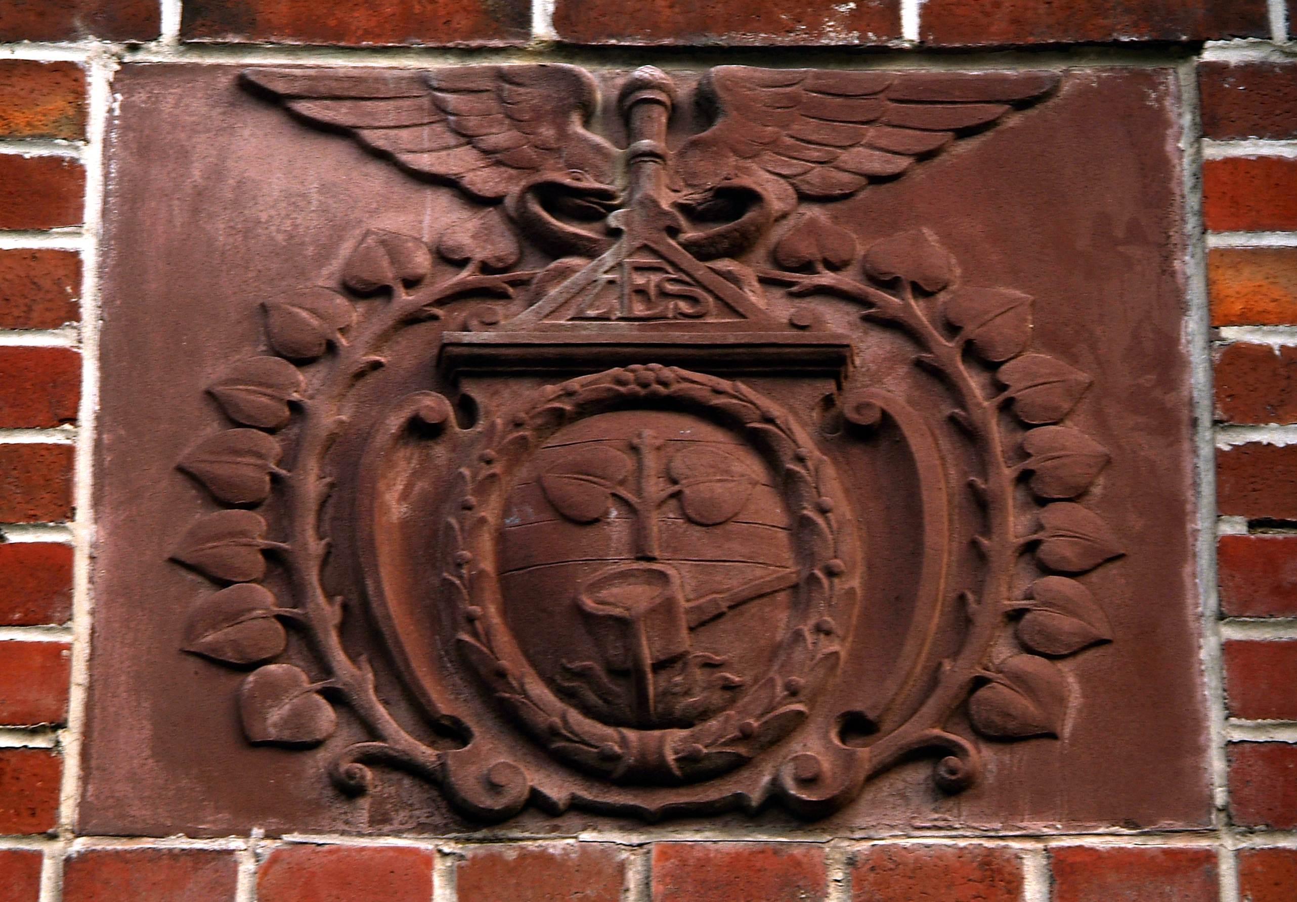 Emblem der Lindener Eisen- und Stahlwerke AG mit dem Kürzel LES unter dem Reichsadler. Das Terrakotta-Relief zwischen den Eingängen der sogenannten Direktoren-Villen nimmt mit seiner Darstellung bezug auf die anfängliche Gießerei per Handarbeit.